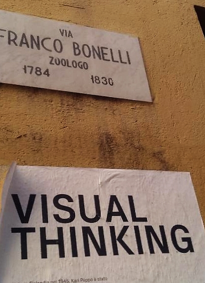 VISUAL THINKING, manifesto a Torino in via Bonelli